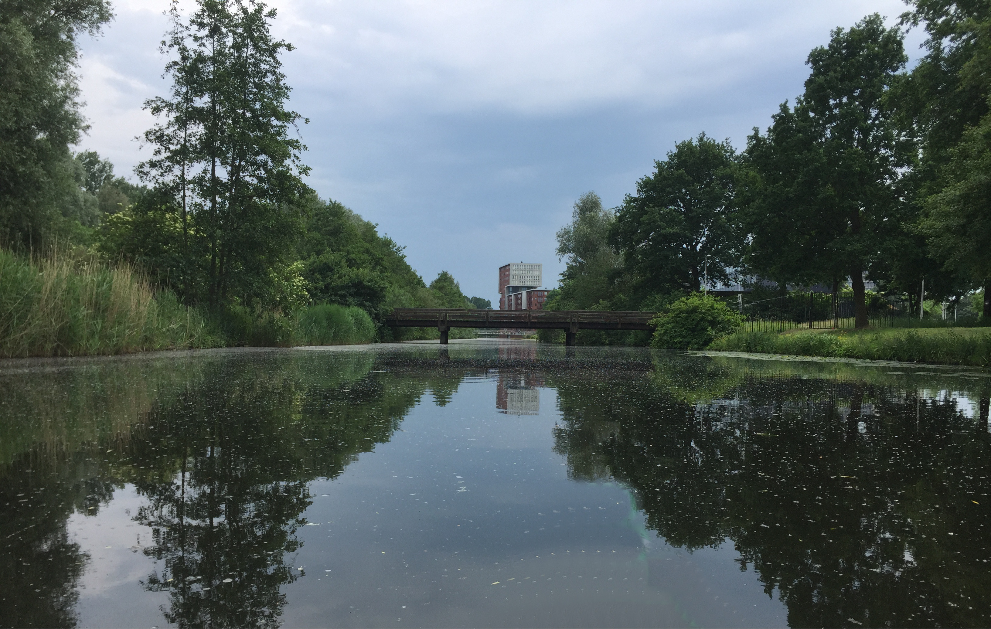 Een fietsbrug (brug 681) bij de Dr.Meurerlaan in Amsterdam-Geuzenveld